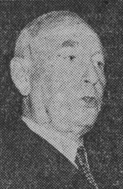 Arkitekten Knut Bildmark